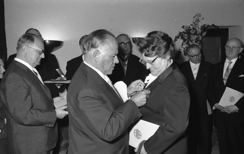 Empfang und Ordensverleihung an Bundestagsabgeordnete durch Bundestagspräsident Dr. Gerstenmaier Bonn (vorne v.l.n.r.: Eugen Gerstenmaier, Frau Helene Wessel)